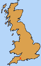 Ilchester. Lec'hiadur